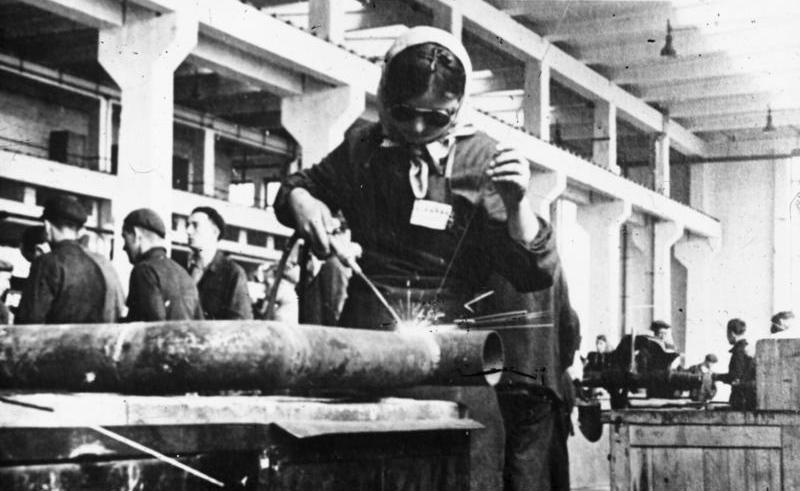 26 Ukrainerin Schweissen